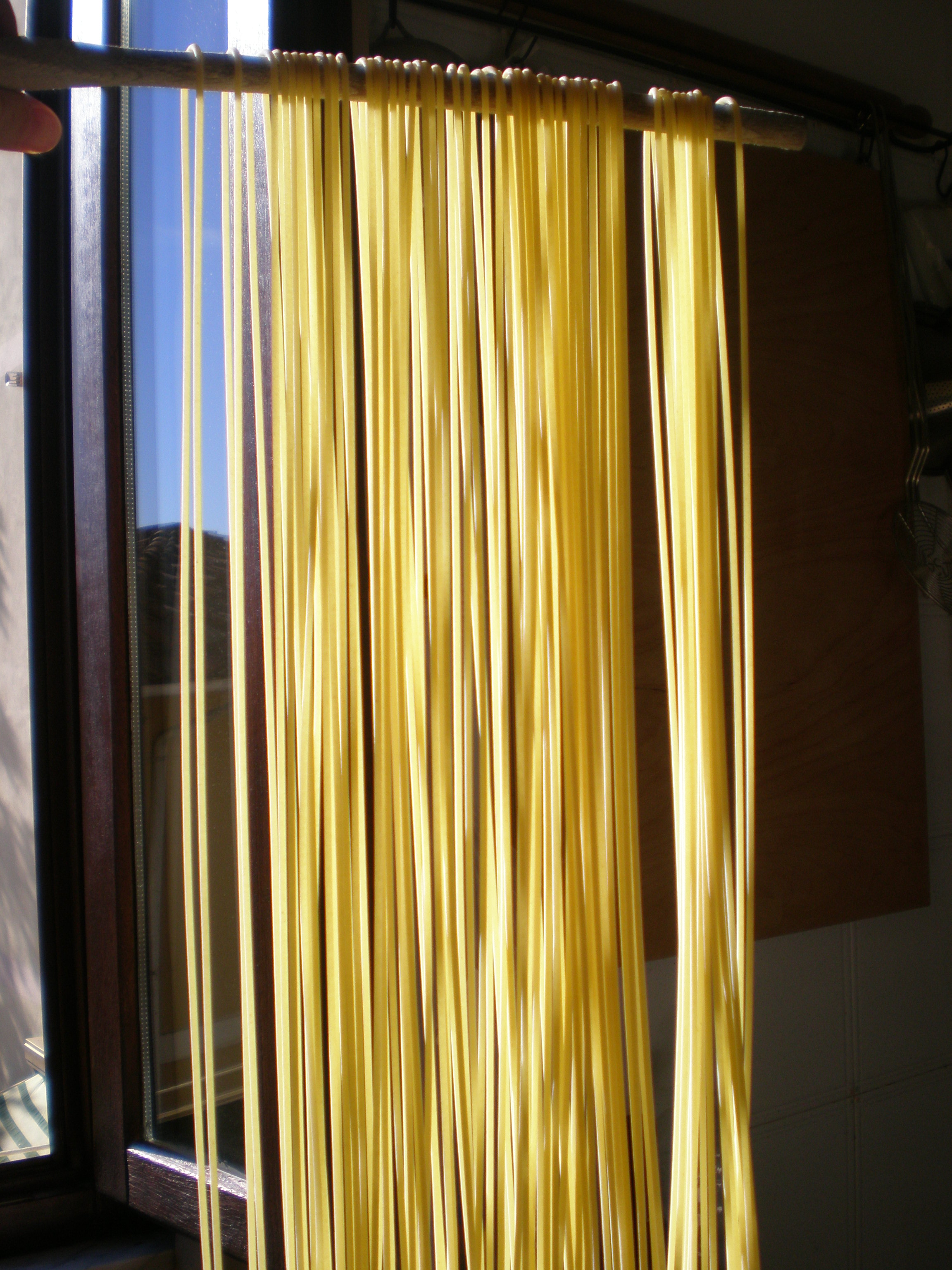 Spaghettoni pugliesi